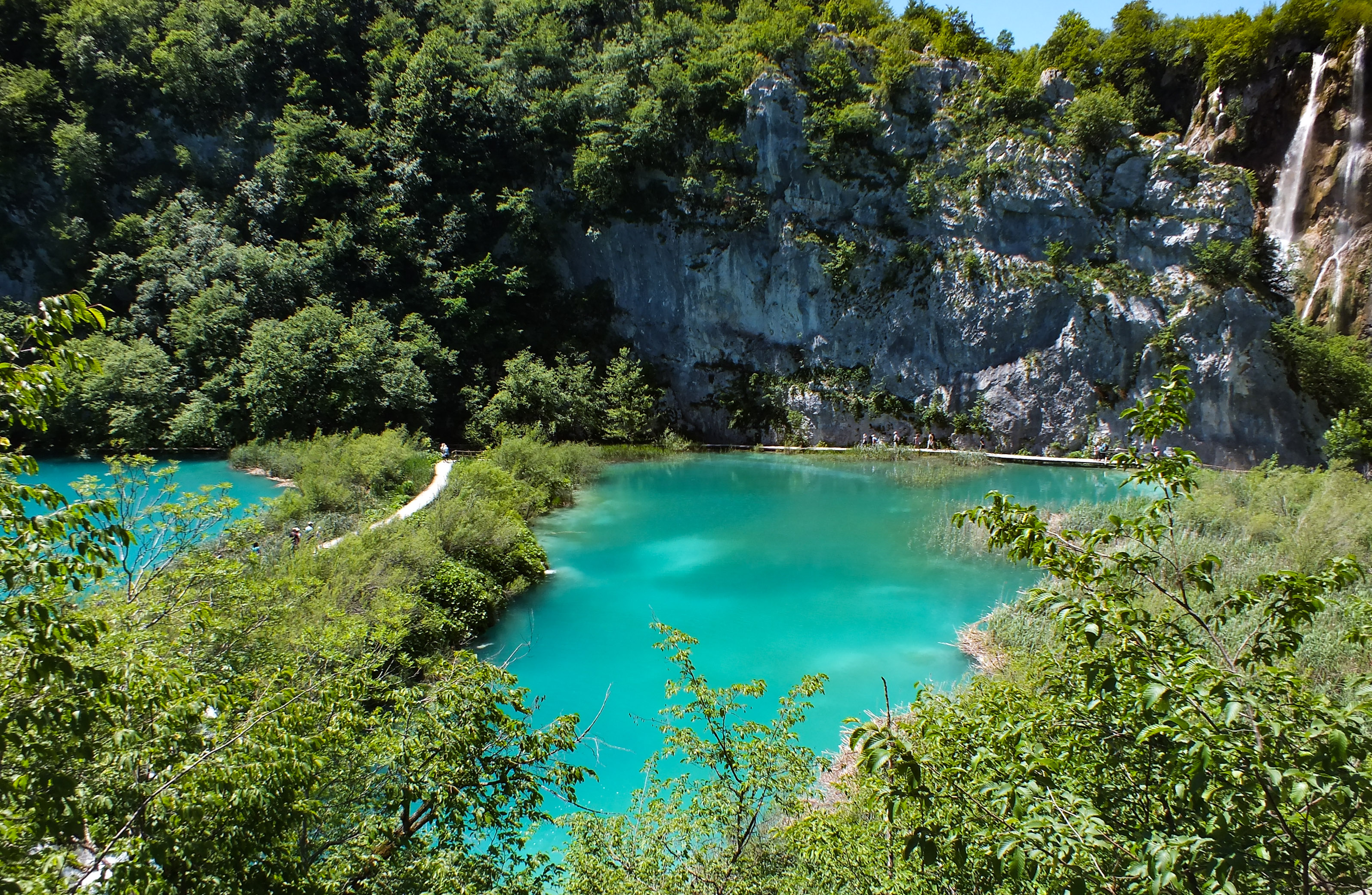 dio atmosfere nacionalnog parka Plitvička jezera